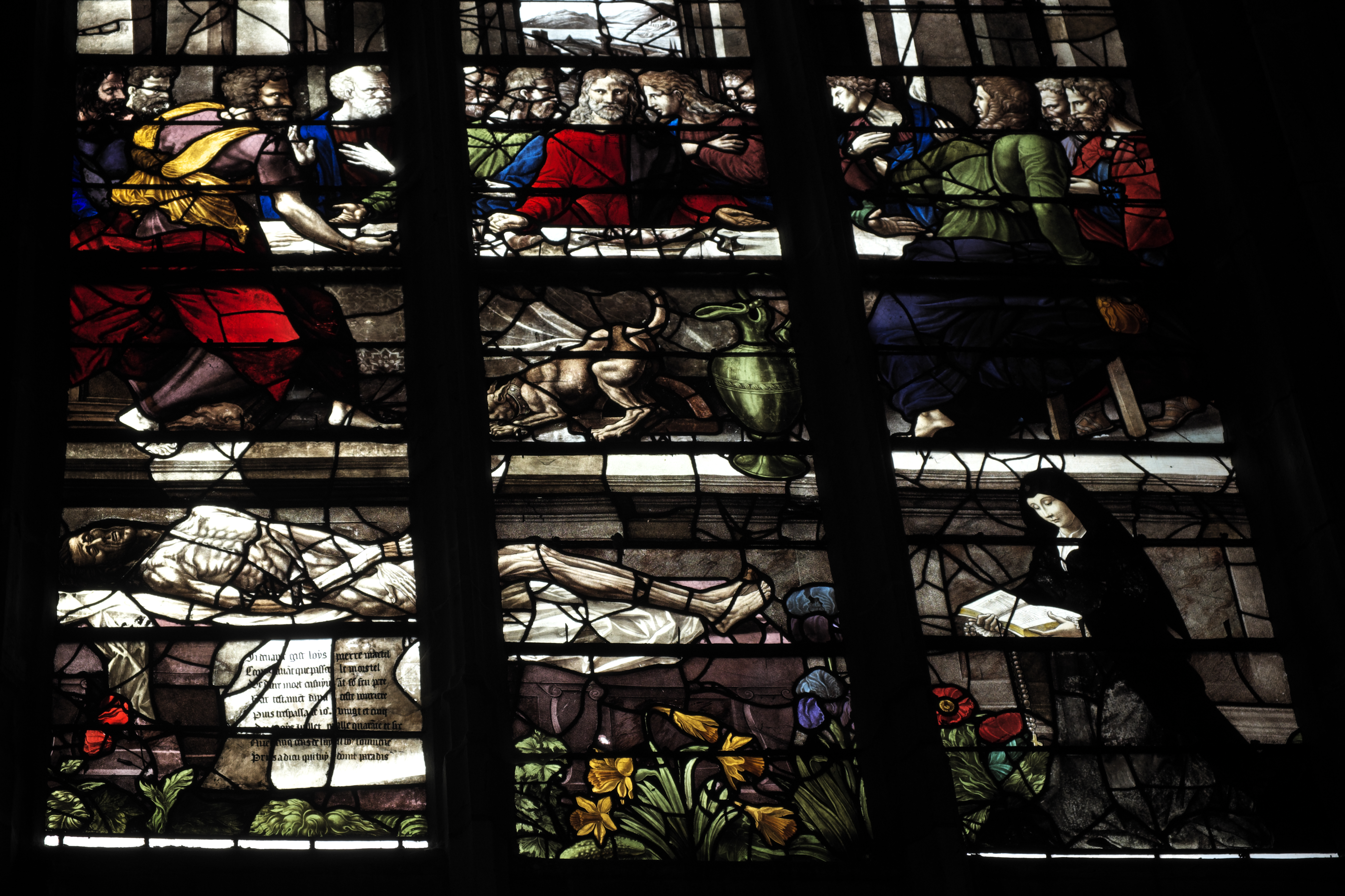 Katholische Kirche Sainte-Foy in Conches-en-Ouche im Département Eure (Haute-Normandie/Frankreich), Bleiglasfenster aus dem 16. Jahrhundert; Darstellung: Letztes Abendmahl, (unterer Ausschnitt)